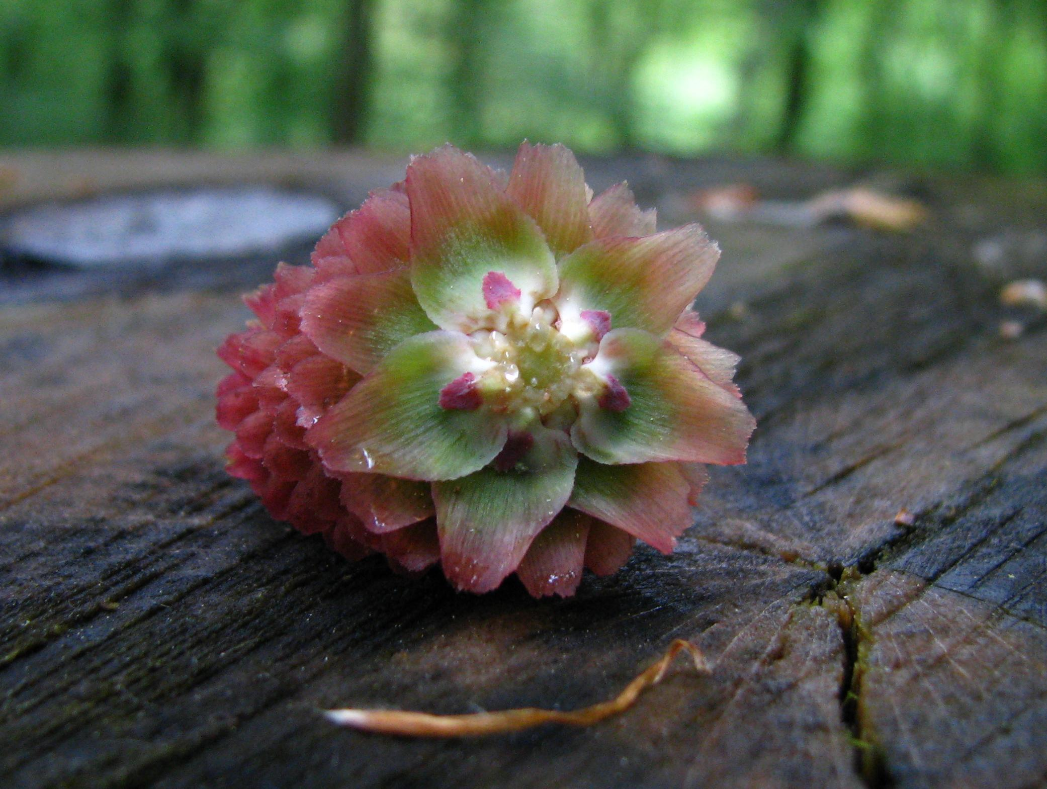 Durchgeschnittener, nicht ausgereifter Zapfen der Gemeinen Fichte Picea abies zur Blütezeit im Querschnitt.